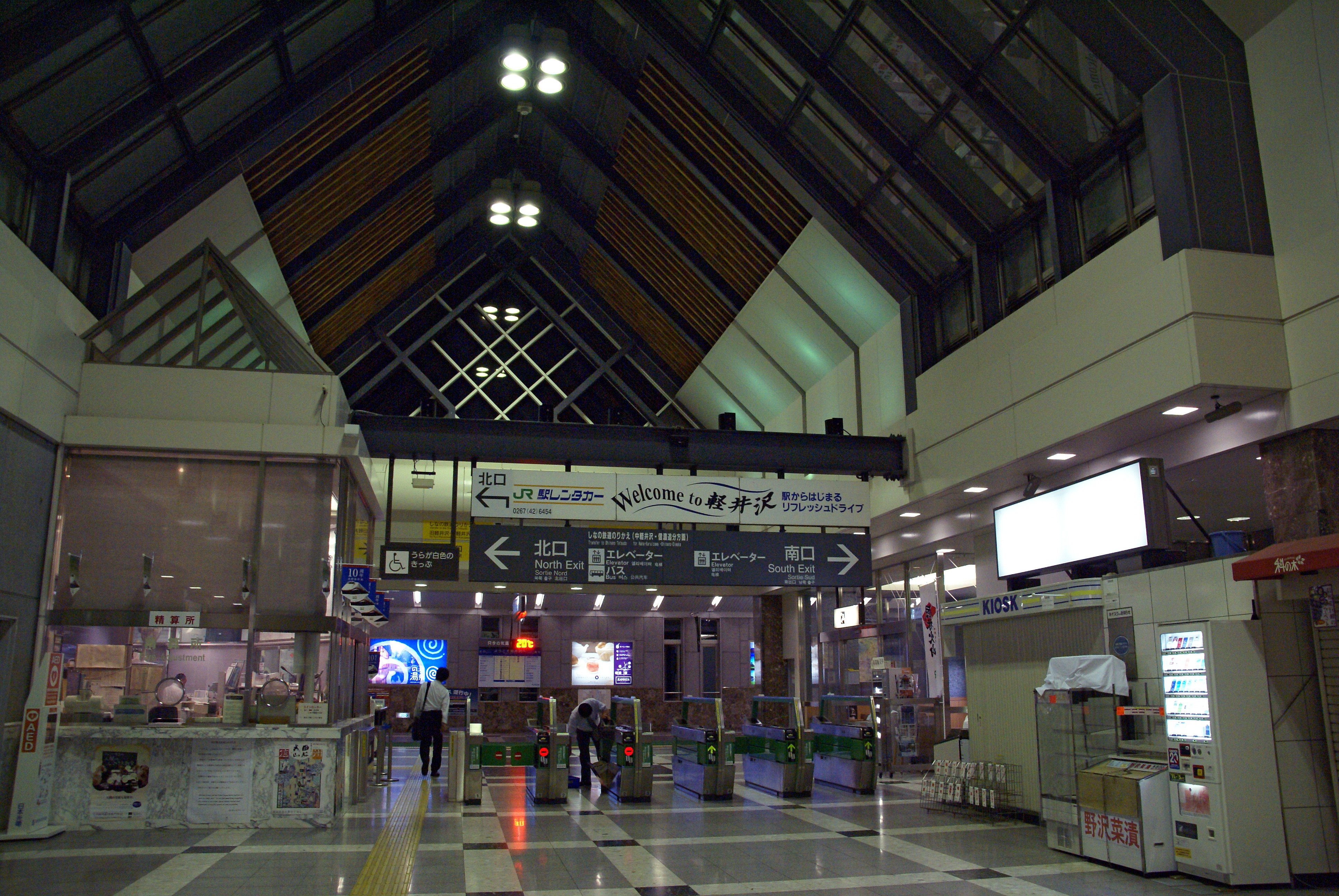 Karuizawa Station in Karuizawa, Nagano prefecture, Japan